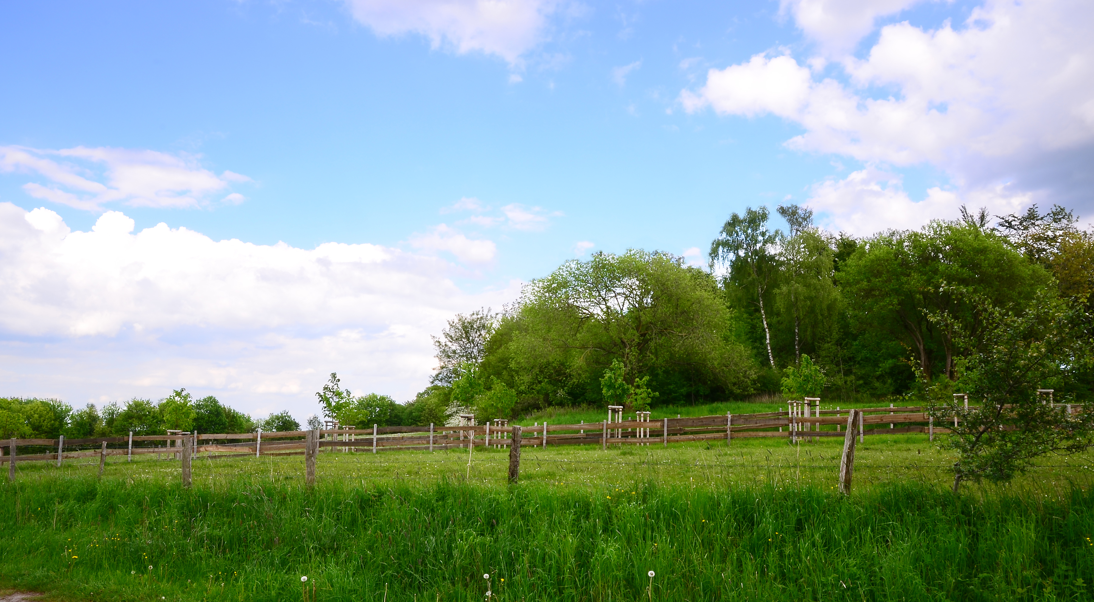 Naturschutzgebiet Burhagener Weg (1), Schlüssel Nummer: HSK-036, Brilon, Nordrhein-Westfalen, Germany.